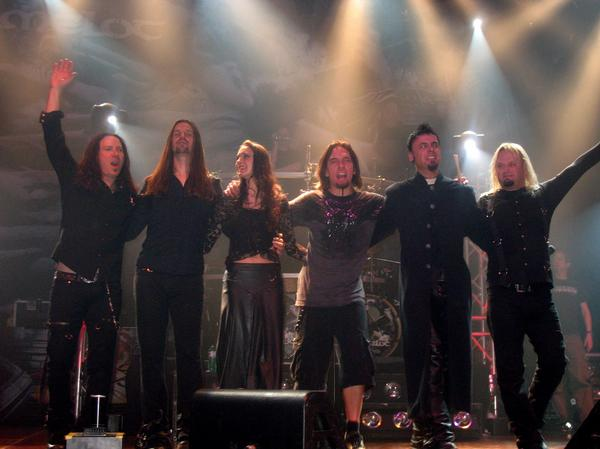 Kamelot - Live in Pratteln 31.03.2009